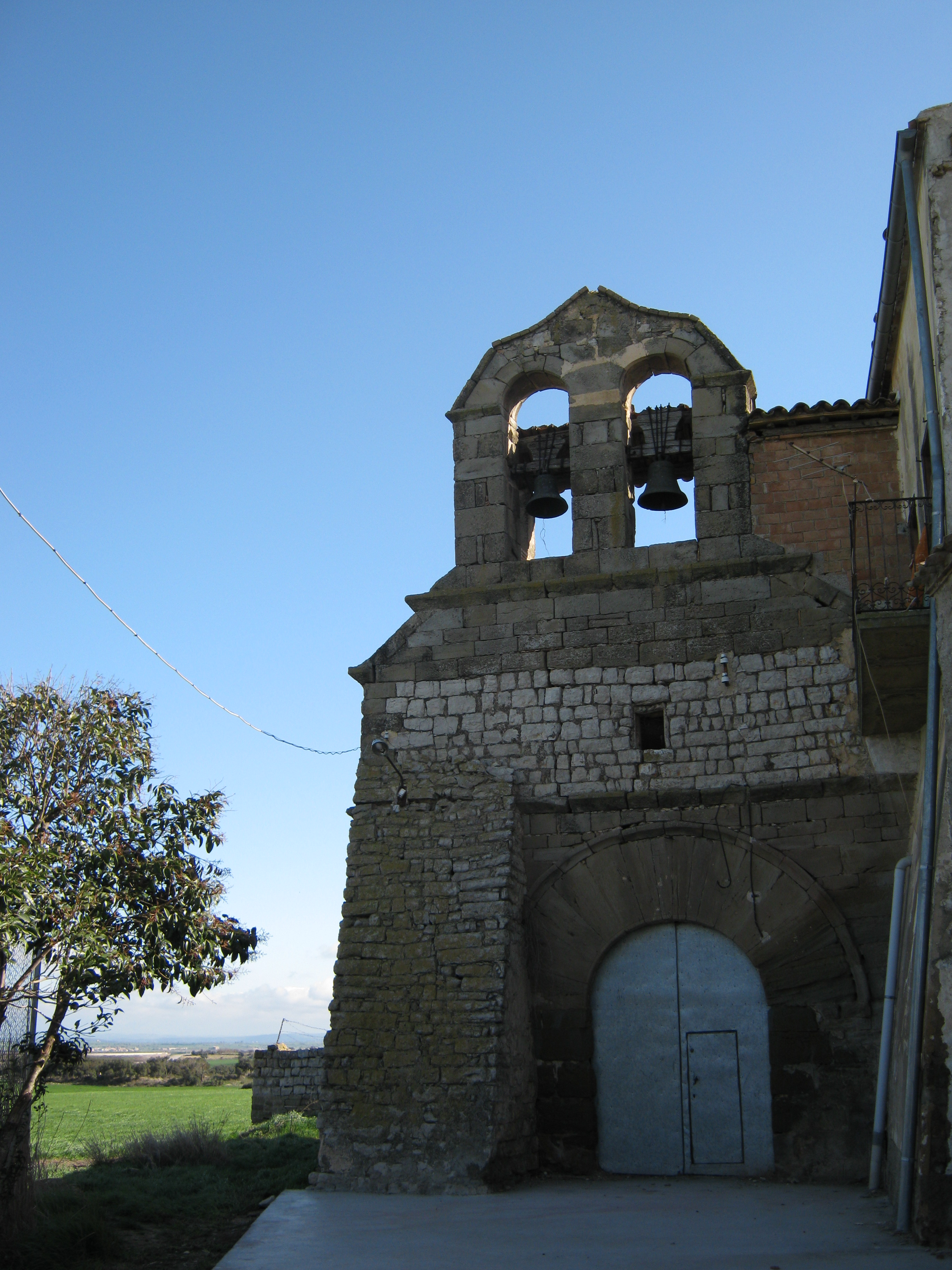 Esglesiola de Sant Pere o dels Apòstols